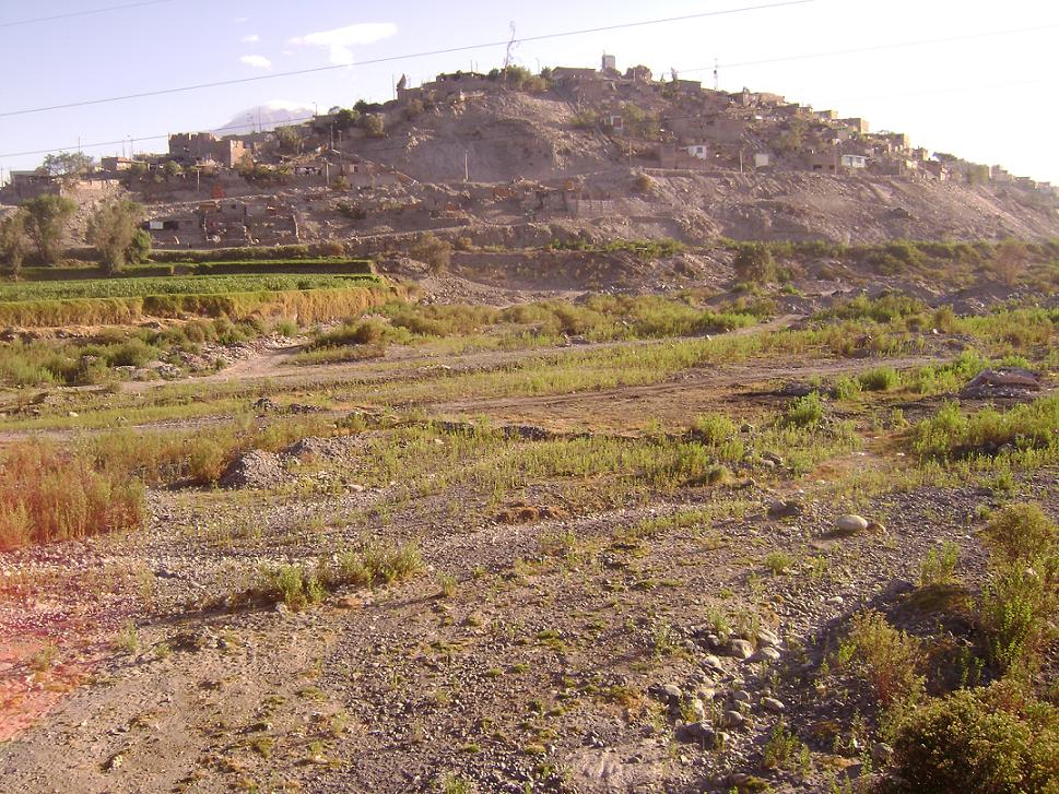 Vista parcial del cerro Alto de la Luna, desde el puente sobre el rio de Socabaya, escenario de la batalla del mismo nombre en 1836, el rio solo tiene ocasional cuadal en época de lluvias entre los meses de enero y marzo, a espaldas del cerro se encuentra el Club de Golf